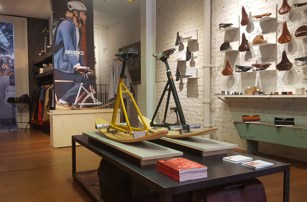 חנות שאילון עיצב